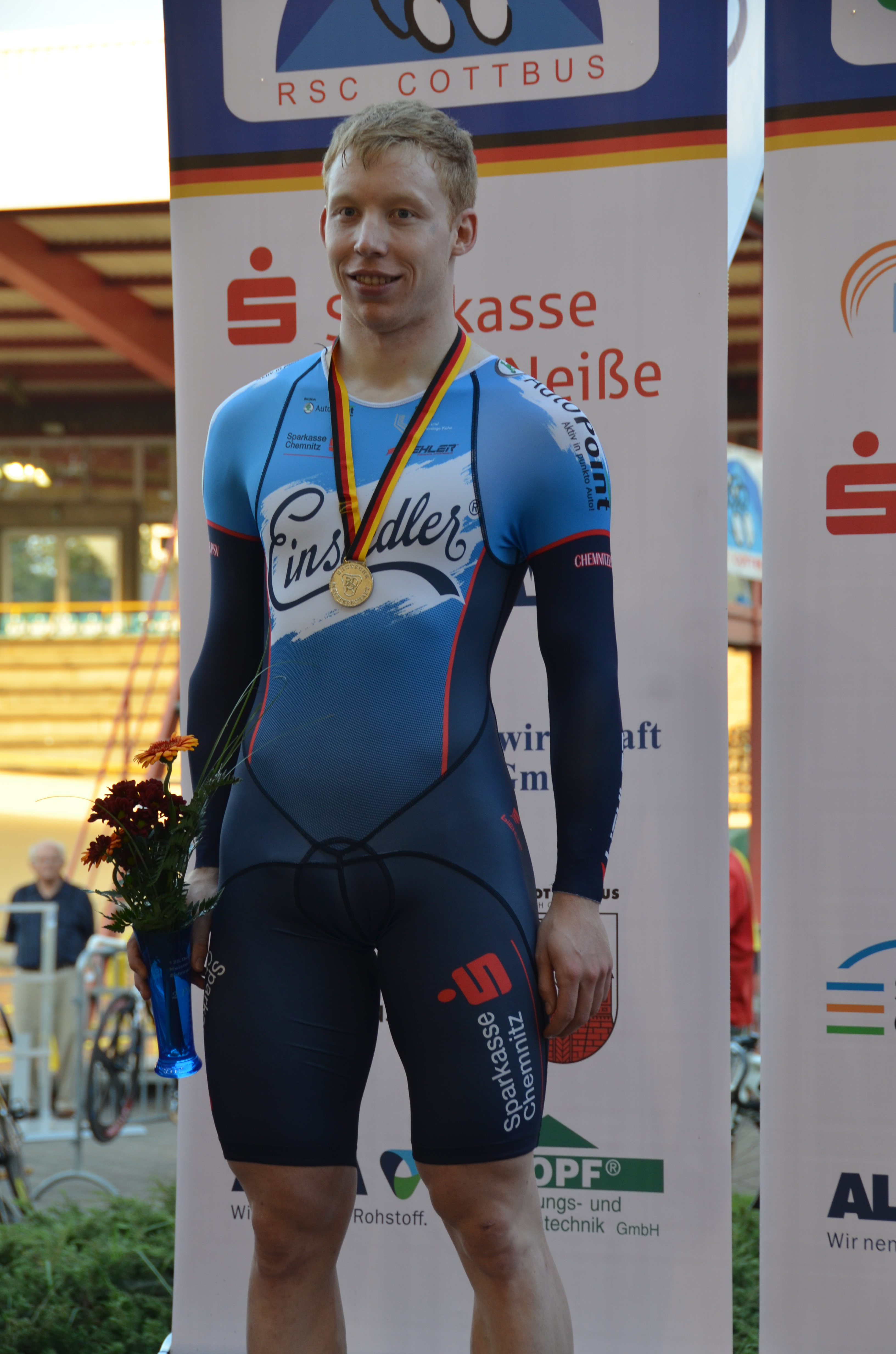 Joachim Eilers, deutscher Radsportler The making of this document was supported by the Community-Budget of Wikimedia Germany.